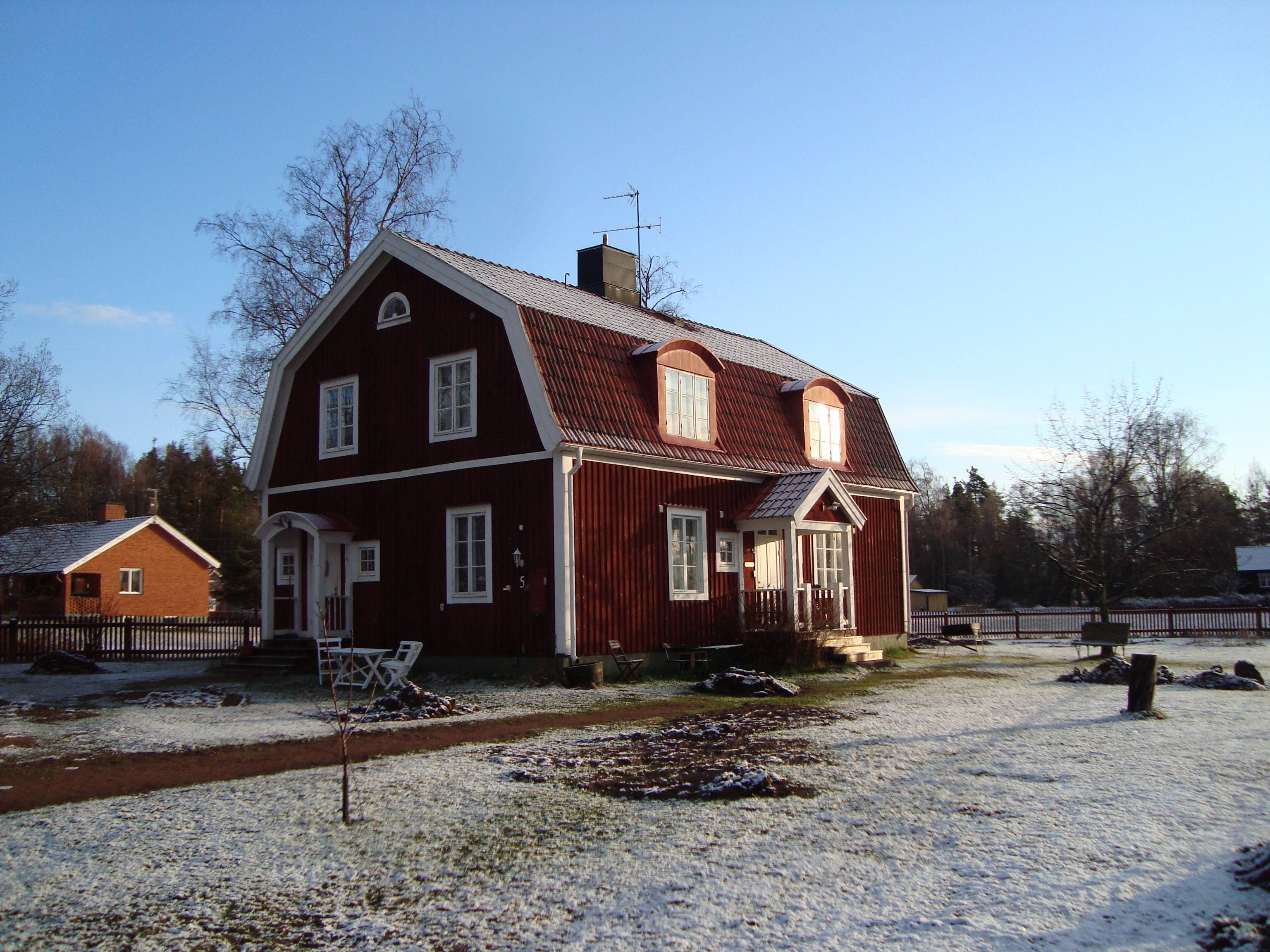 Gamla lärarbostaden till Vinäs skola, numera vandrarhem, Mora kommun, Sverige